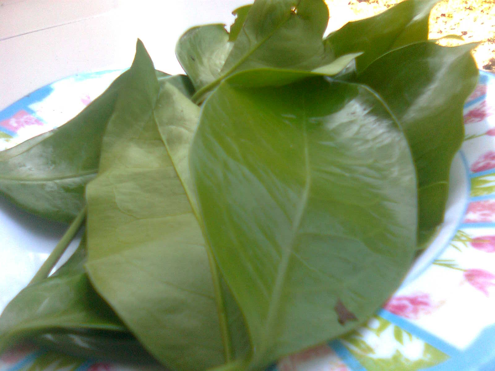 Godhong So